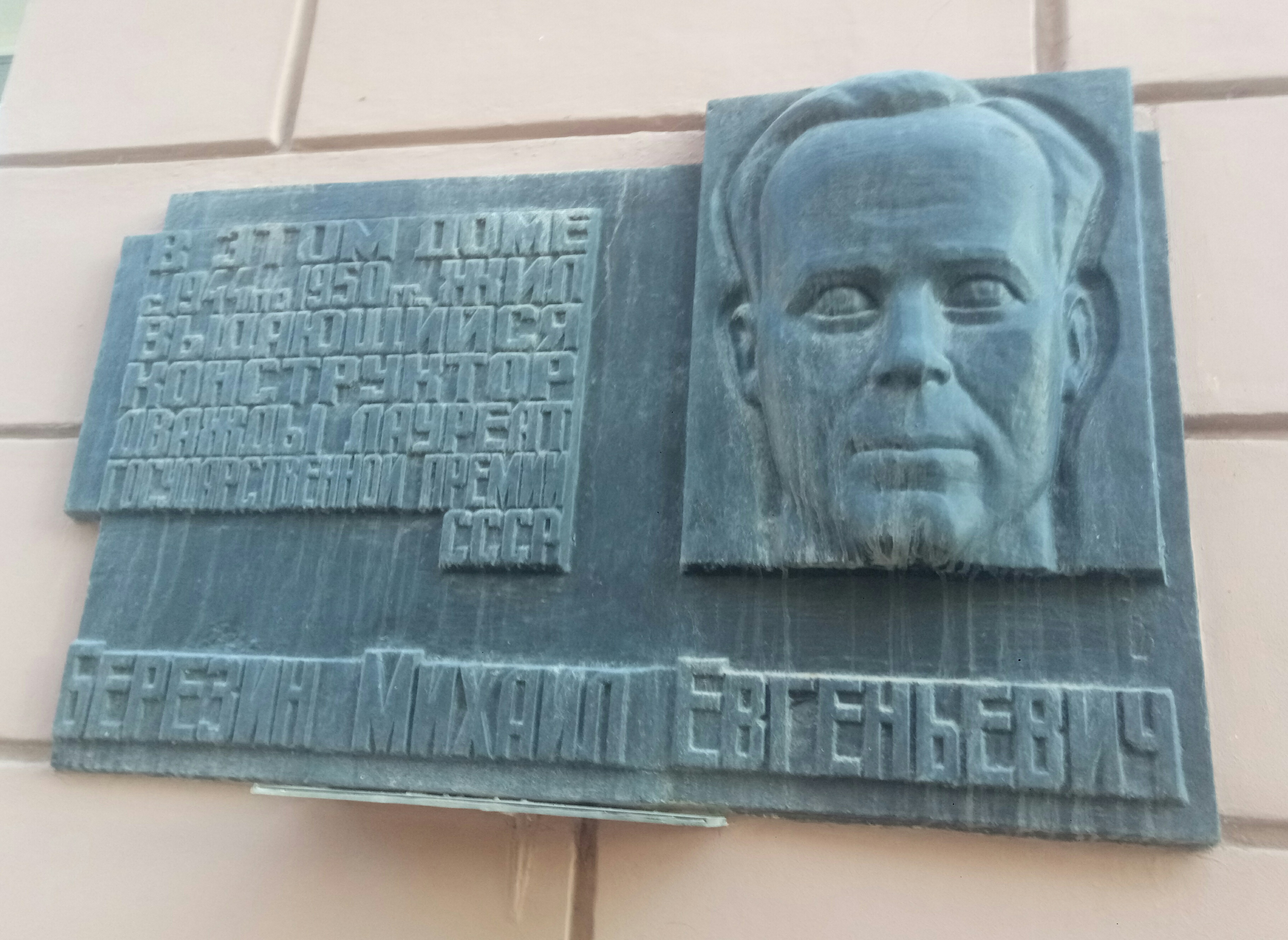 Березин, Михаил Евгеньевич